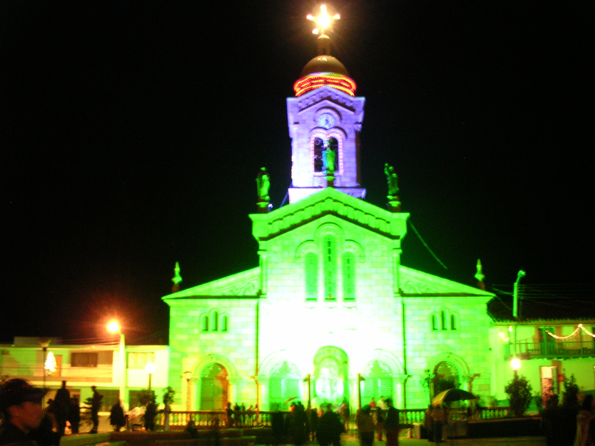 iglesia de guican nocturna